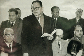 신병 치료를 위해 미국으로 떠날 계획을 발표하는 조병옥 (1960.01), 뒷줄 오른쪽 맨 끝은 곽상훈